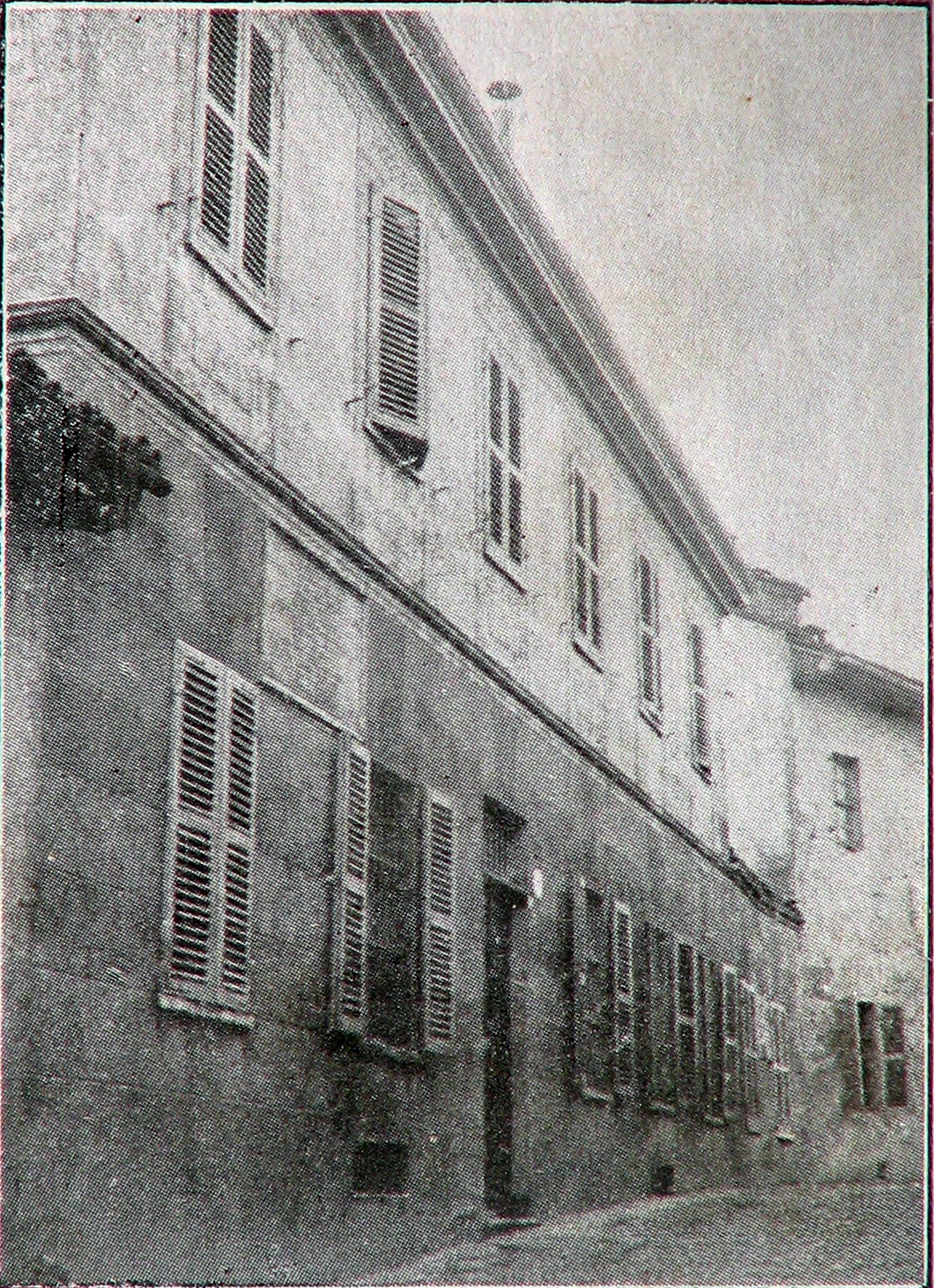 Casa natale di Giovanni Battista De Rolandis a Castell'Alfero, fotografia pubblicata sul libro di G. Montersino, GB de Rolandis, martire astigiano, Asti 1926.